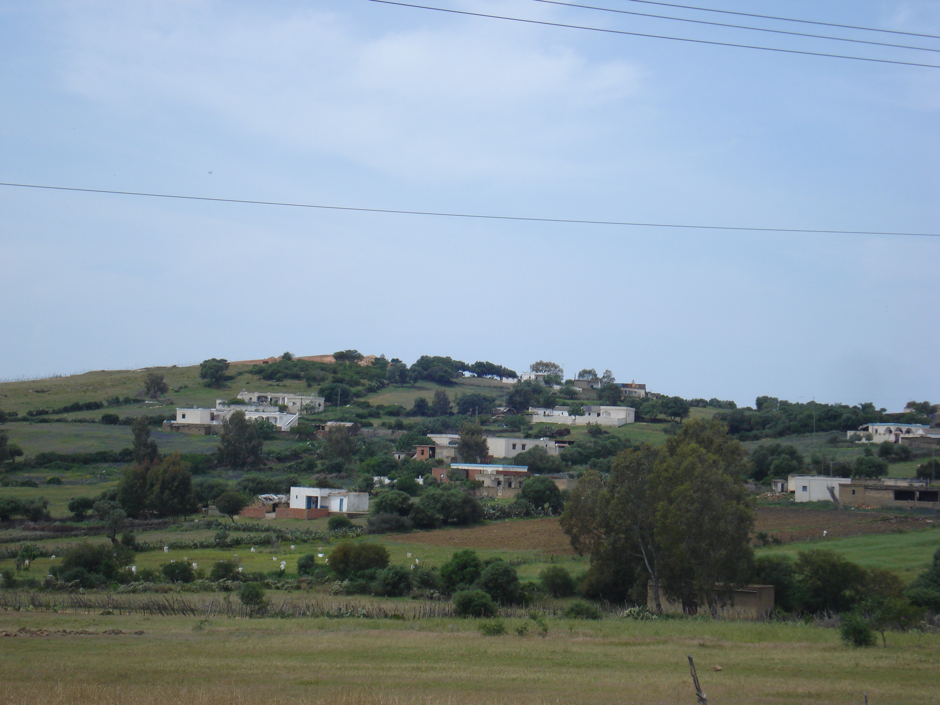 Village "Eddahra الدحرة" sur la Route Régionale n°58, Délégation de Sejnane, Gouvernerat de Bizerte, Tunisie